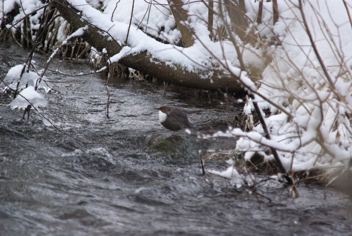 Wasseramsel im verschneiten Urseebach